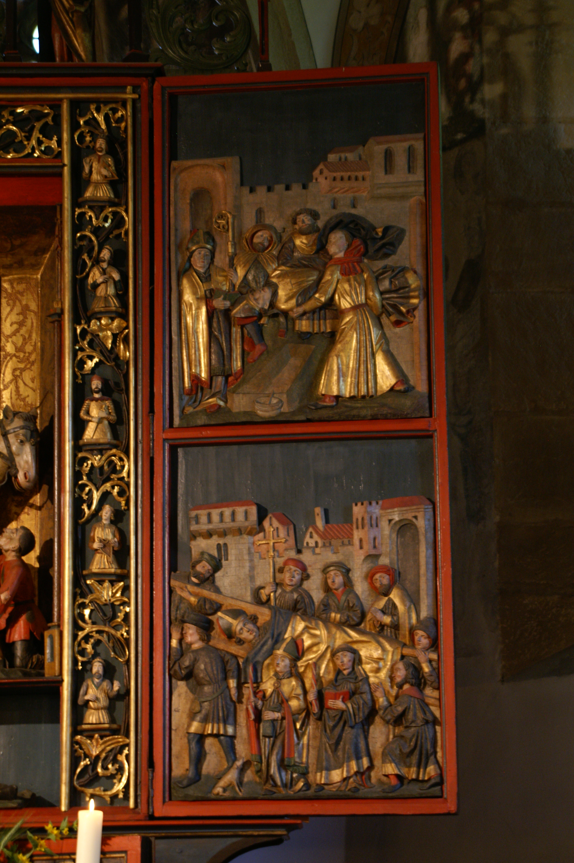 Martinsaltar St.-Martinskirche (Stöckenburg). Rechte Flügeltür (Innenseite).